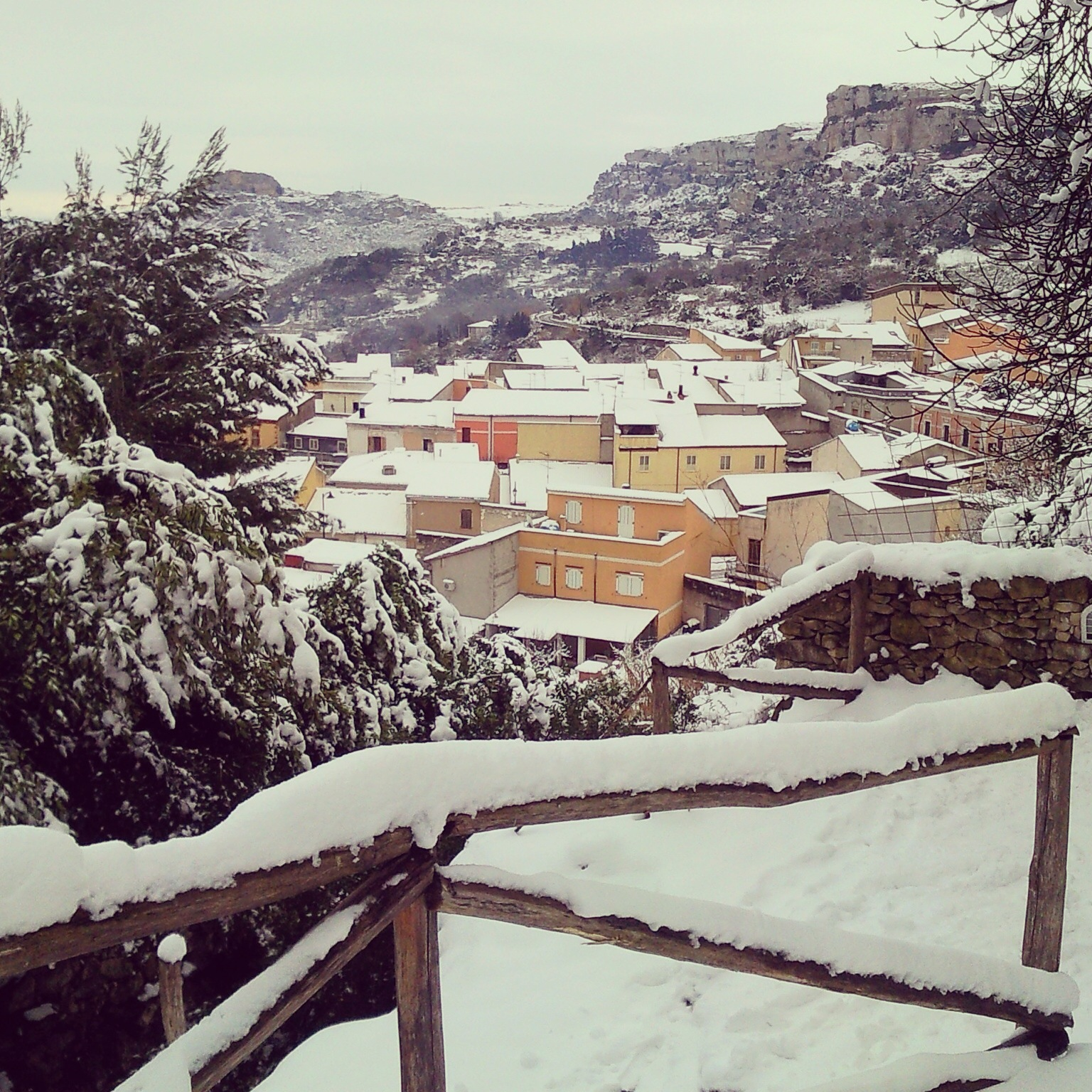 Pittoresca immagine di Cargeghe sotto la neve